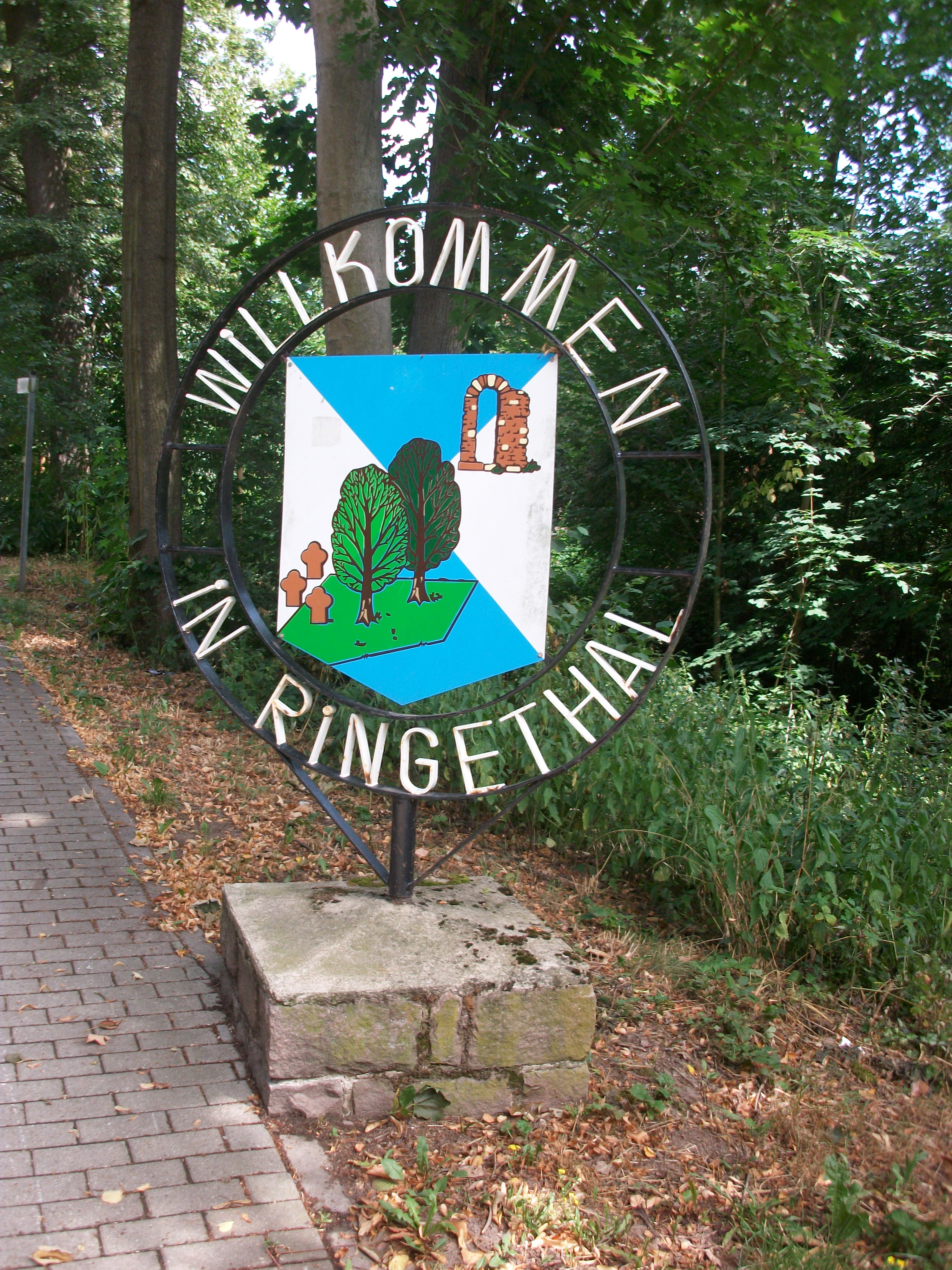 Ringethal, Ortsteingangsschild